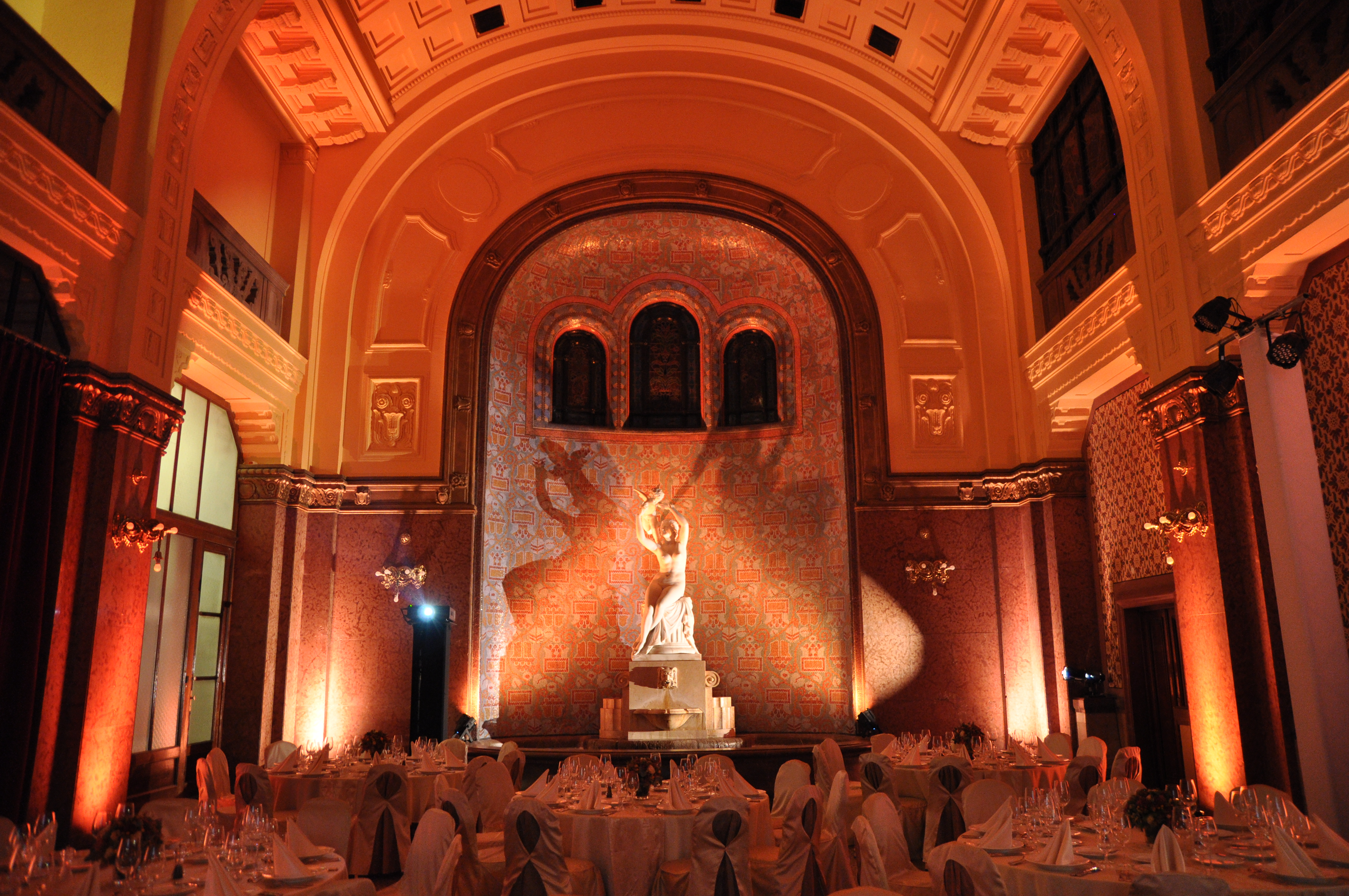 Budapest, Gellért fürdő, előcsarnok